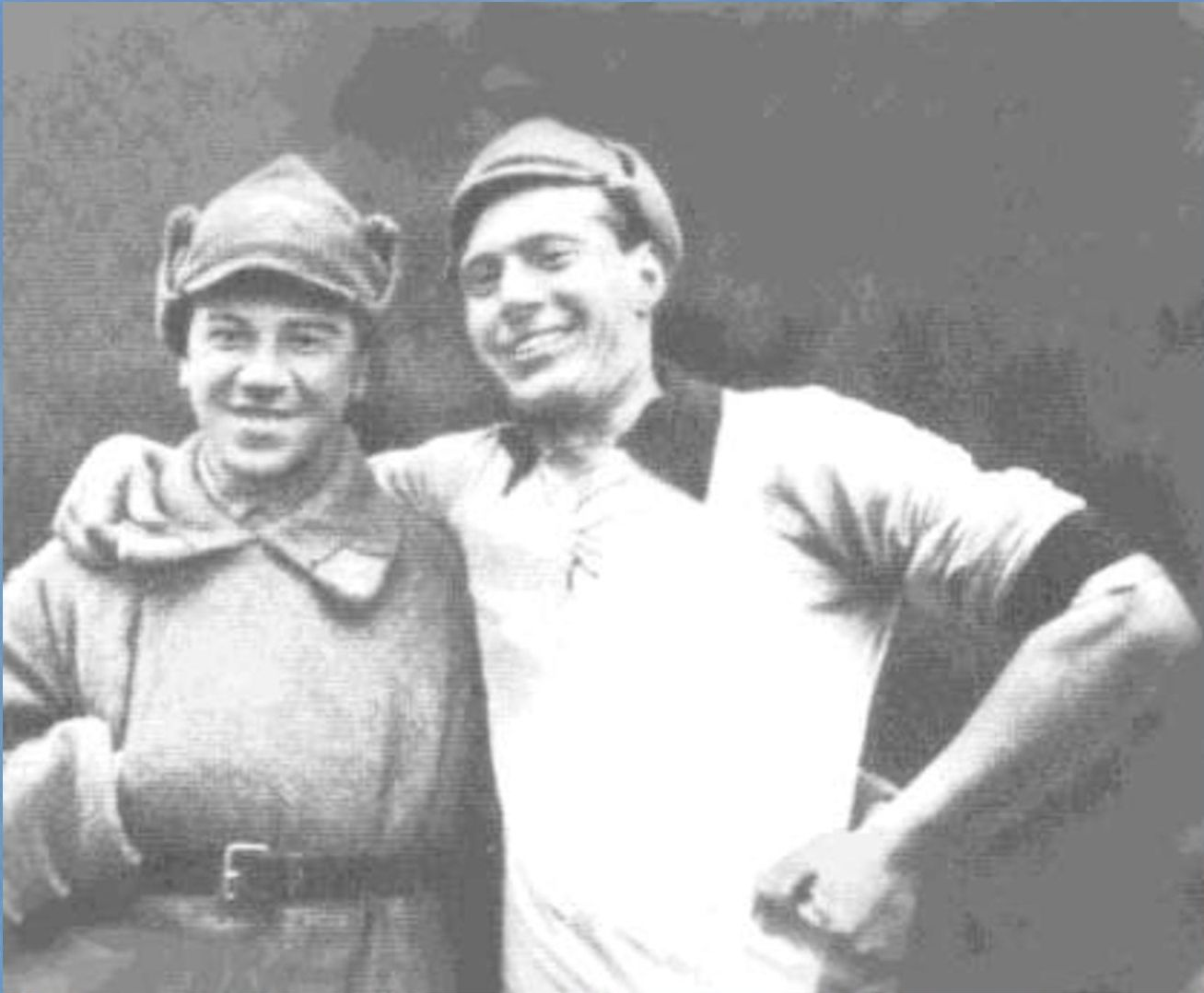 Иван Комзин (справа) - курсант лётно-технической школы во время занятий физкультурой